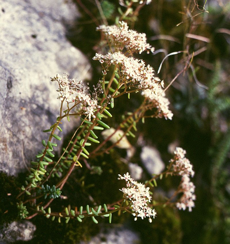 Weiße Fetthenne (Sedum album), Dickblattgewächse (Crassulaceae) - Österreich/Austria/Autriche: Niederösterreich, Erlauftal E Gaming, Vordere Tormäuer